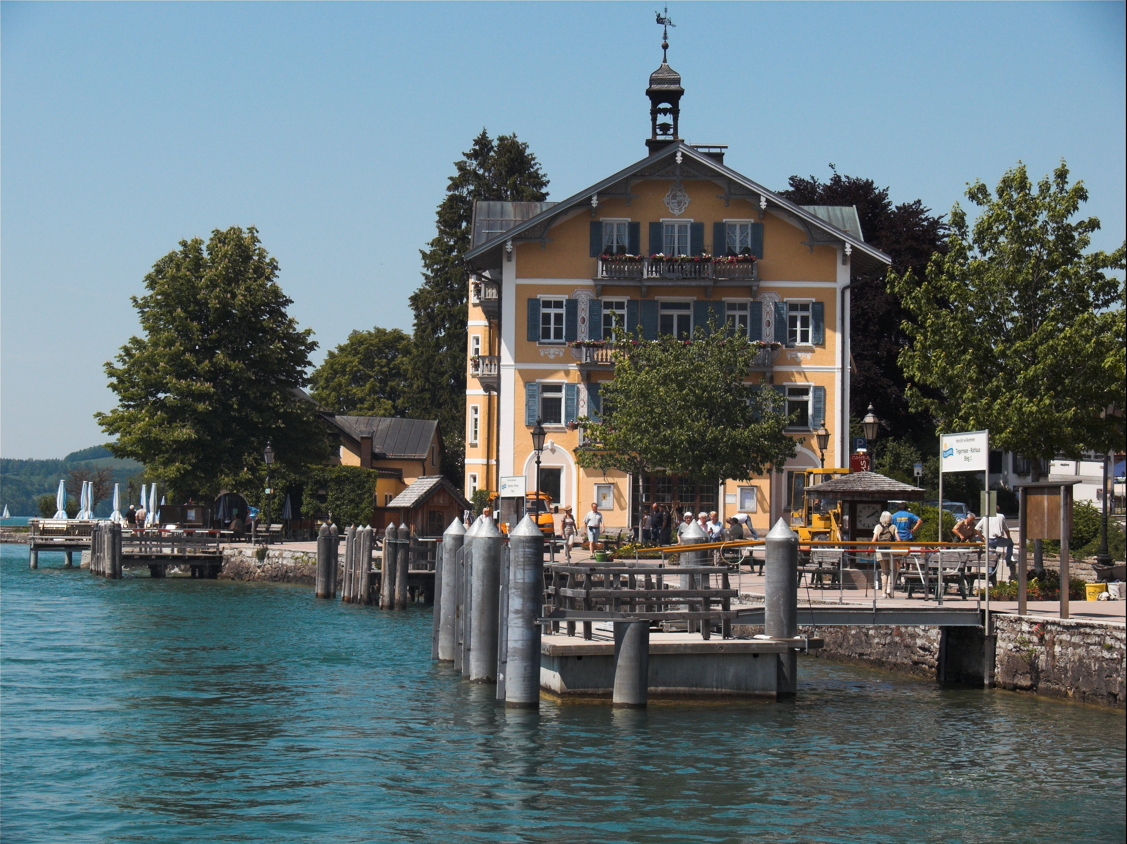 Ortzentrum von Tegernsee mit Rathaus und Bootsanleger